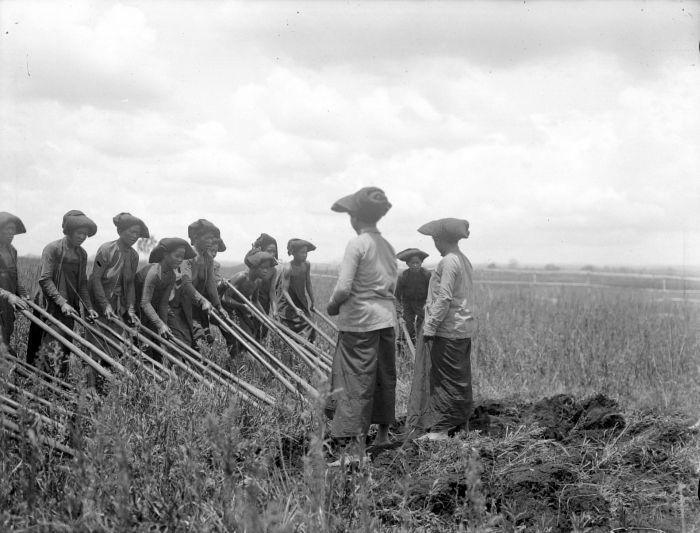 Negatief. Bij de Bataks was een groot deel van de bewerking van de (sawah)gronden in handen van de vrouwen. De tamelijk dichtbevolkte Batakhoogvlakte was al in de 19e eeuw grotendeels ontbost, zodat ladangbouw er niet meer mogelijk was. De rijst teelt werd hier dan ook grotendeels op sawahs bedreven. Voor grondbewerking had men vaak buffels (karbouwen) die een ploeg trokken of de al natte grond met hun poten tot een gelijkmatige brei omwoelden. Waren er geen buffels (of waren de regens laat), dan werd de grond met de hak bewerkt. Op Sumatra sprak men van 'tjankollen' (van cangkul), op Java (meestal) van 'patjollen' (pacul). (P. Boomgaard, 2001). Tjangkollen door vrouwen, Karo-Hoogvlakte